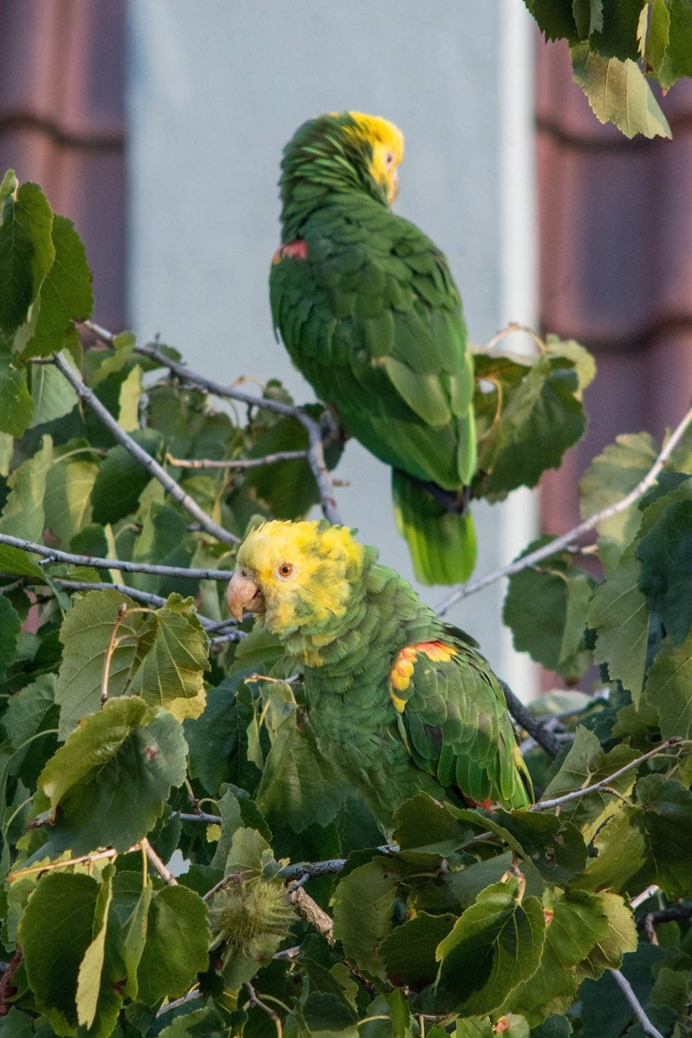 Frei lebende Gelbkopfamazonen in Stuttgart-Bad Cannstatt